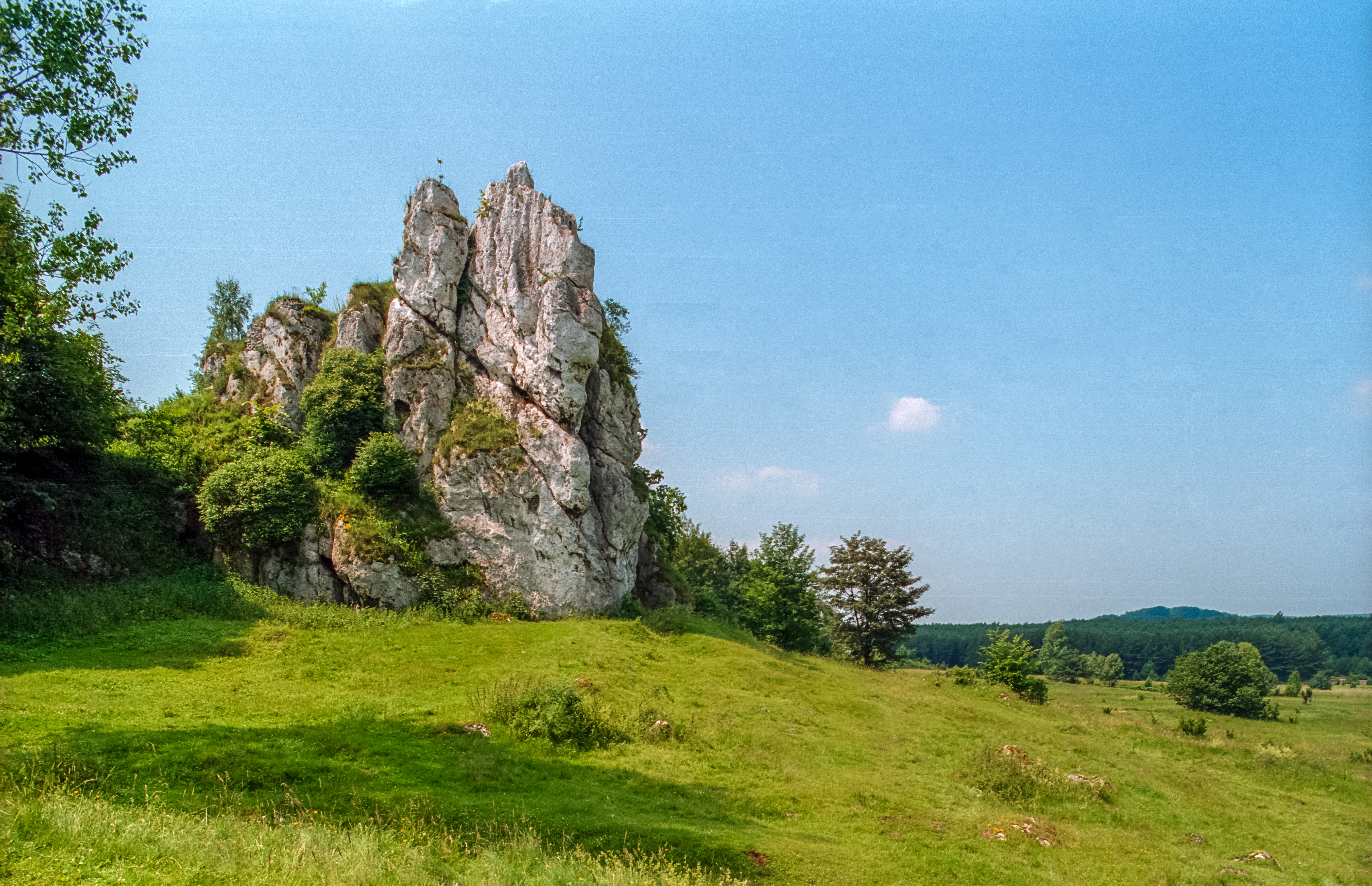 Lutowiec castle